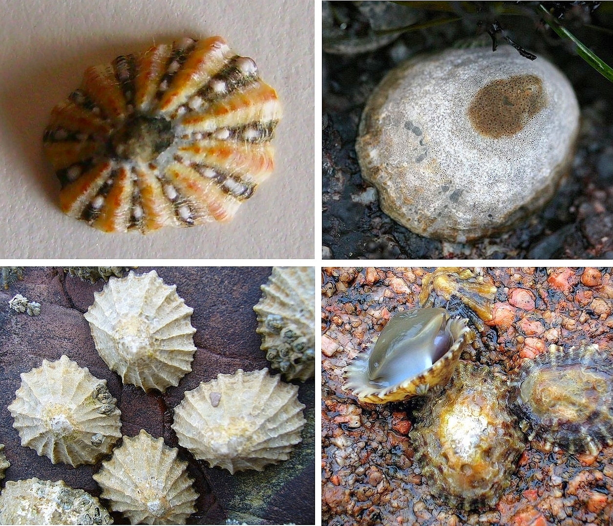 Composite of 4 Patellogastropoda (Limpets) Napfschnecken Galizien Collisella pelta Common limpets Cellana ornata